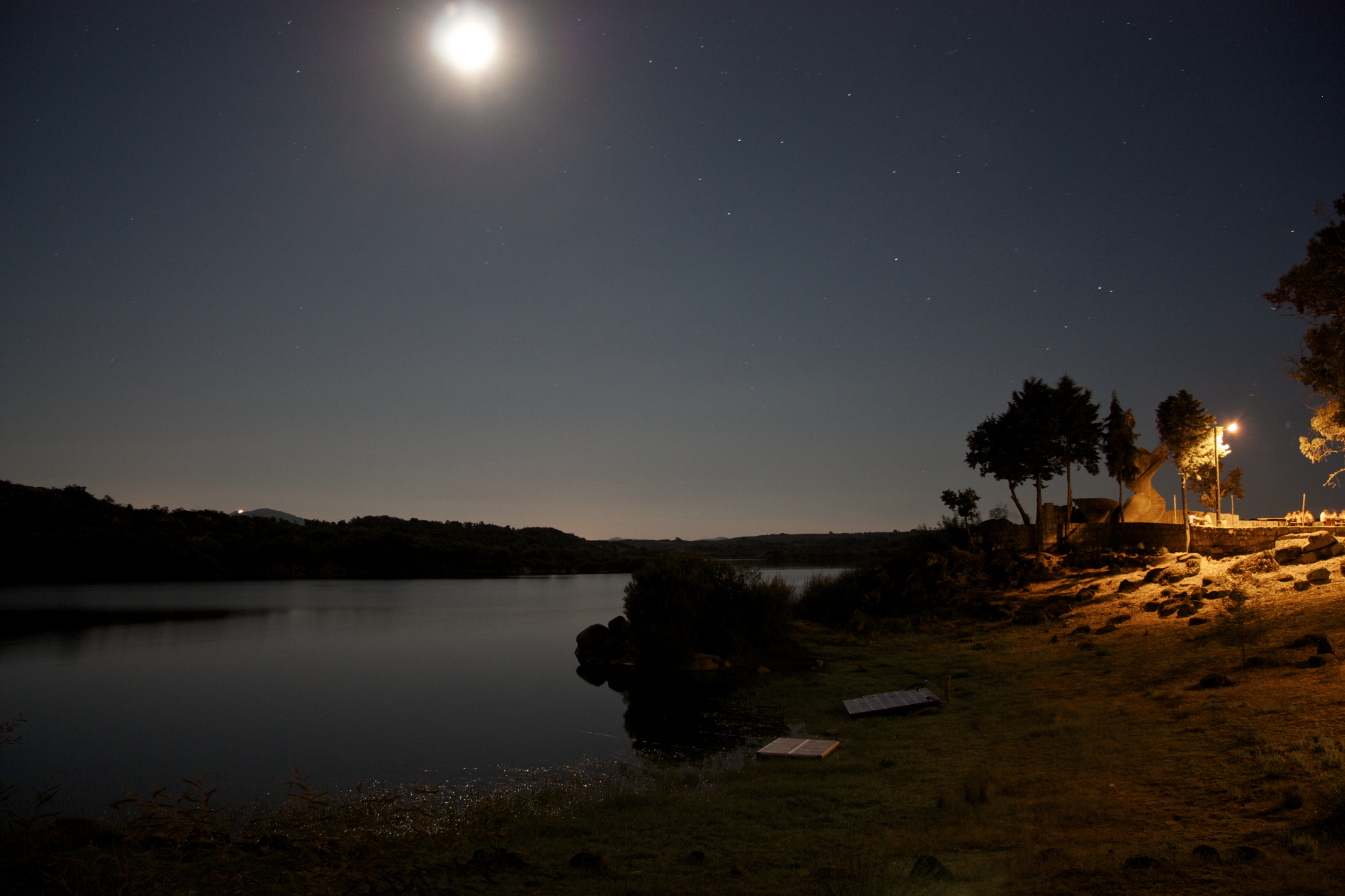 a lua a crescer junto à Barragem de Póvoa e Meadas. em simultâneo, ultimam-se os preparativos para a edição de 2013 do Festival Andanças.